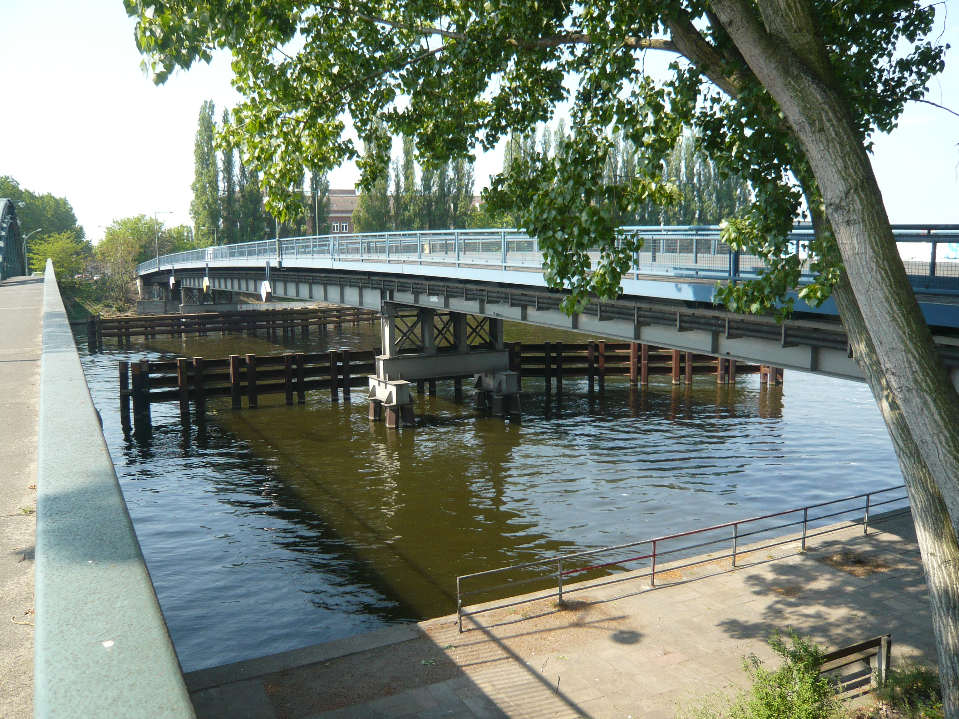 Stubenrauchbrücke in Berlin-Oberschöneweide: Behelfsbrücke